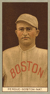 Hub Perdue baseball card